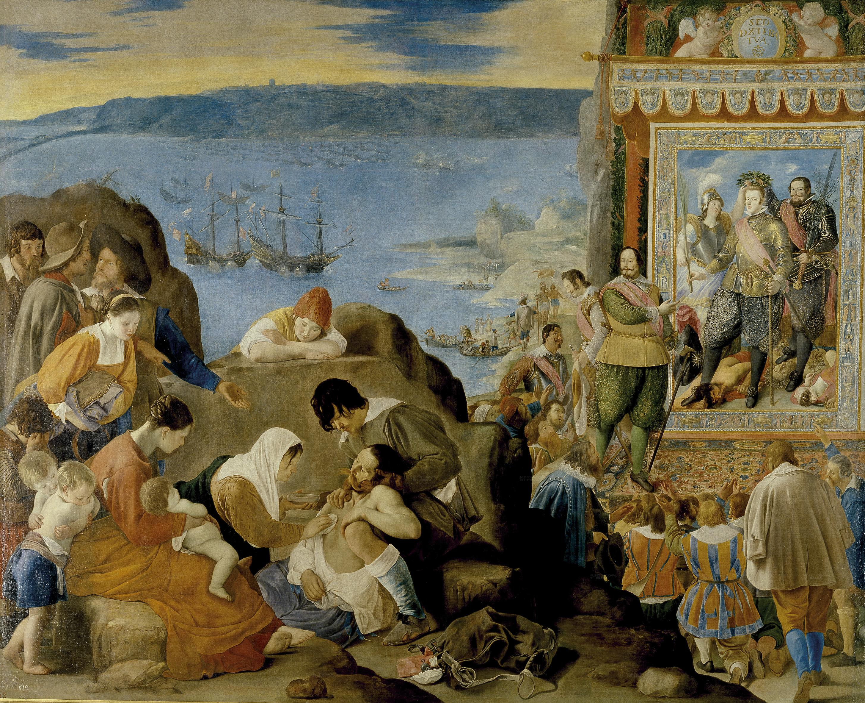 Representa la reconquista de Salvador de Bahía por las tropas hispano-portuguesas bajo el mando de Don Fadrique de Toledo el 1 de mayo de 1625, contra las fuerzas holandesas que la tenían ocupada.